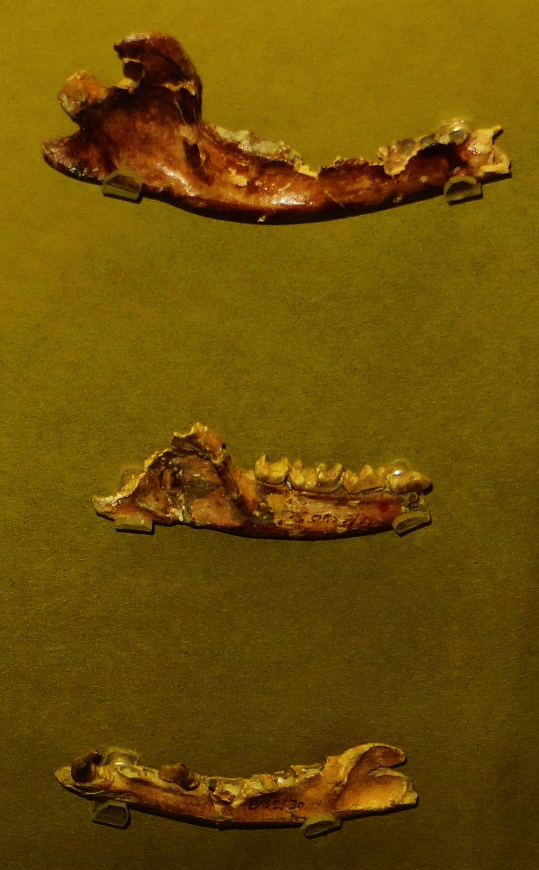 Fossil - took the picture at Museo Scienze Naturali di Faenza